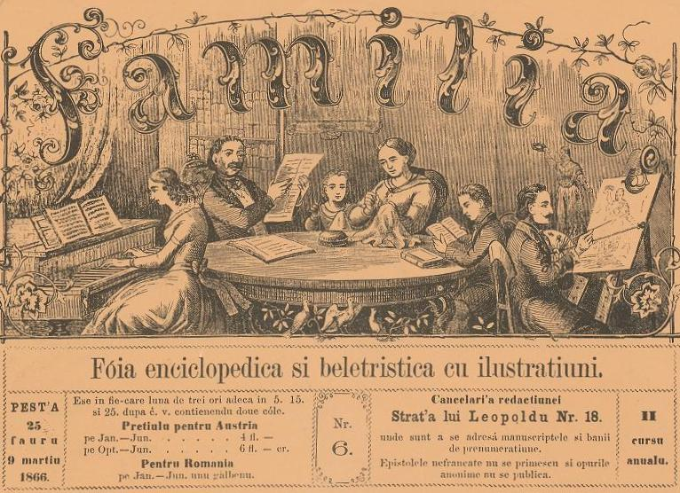 Logo al revistei Familia, nr. 6, 9 martie 1866